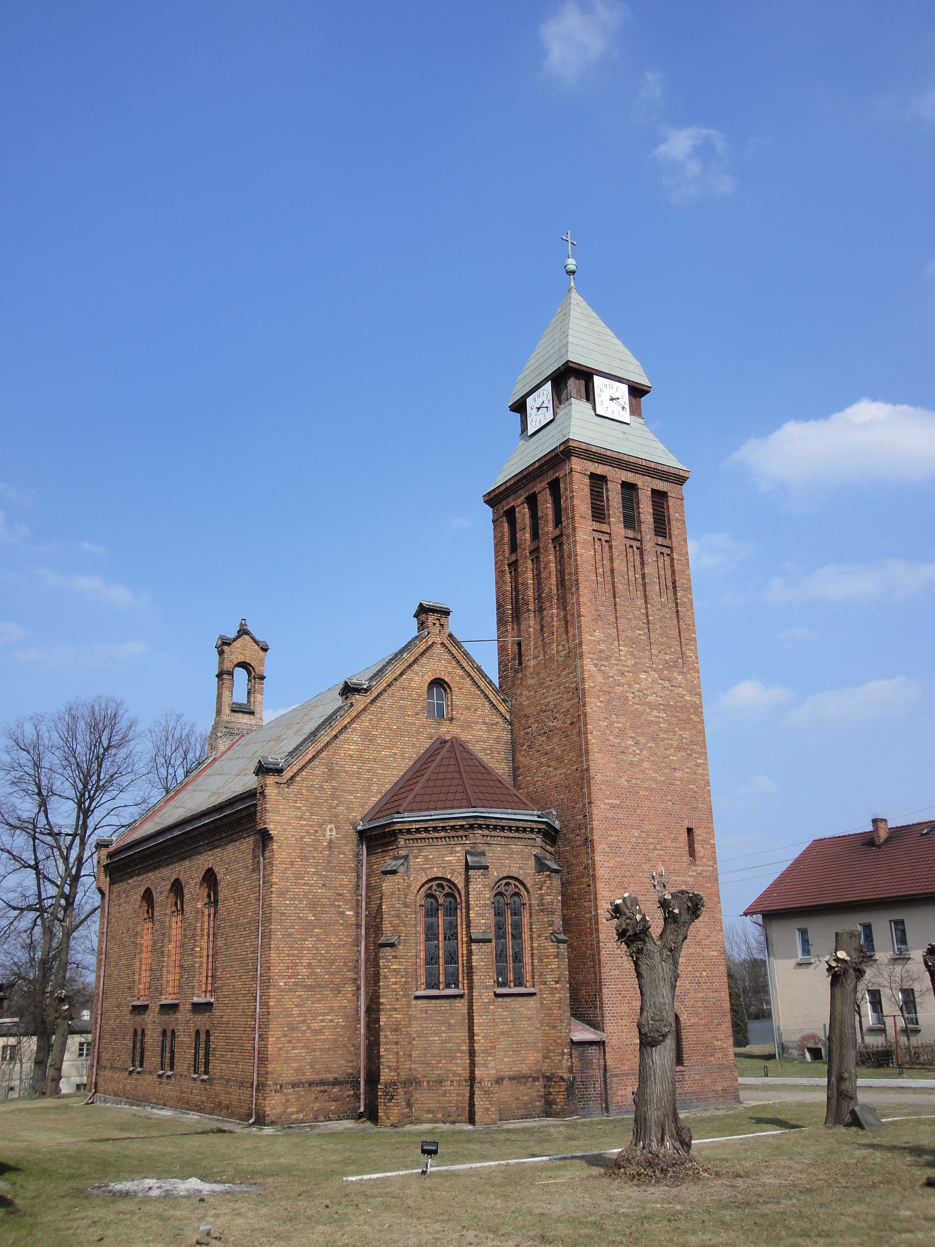 Węgliniec - kościół pw. NMP Królowej Polski, ul. Kolejowa 6.